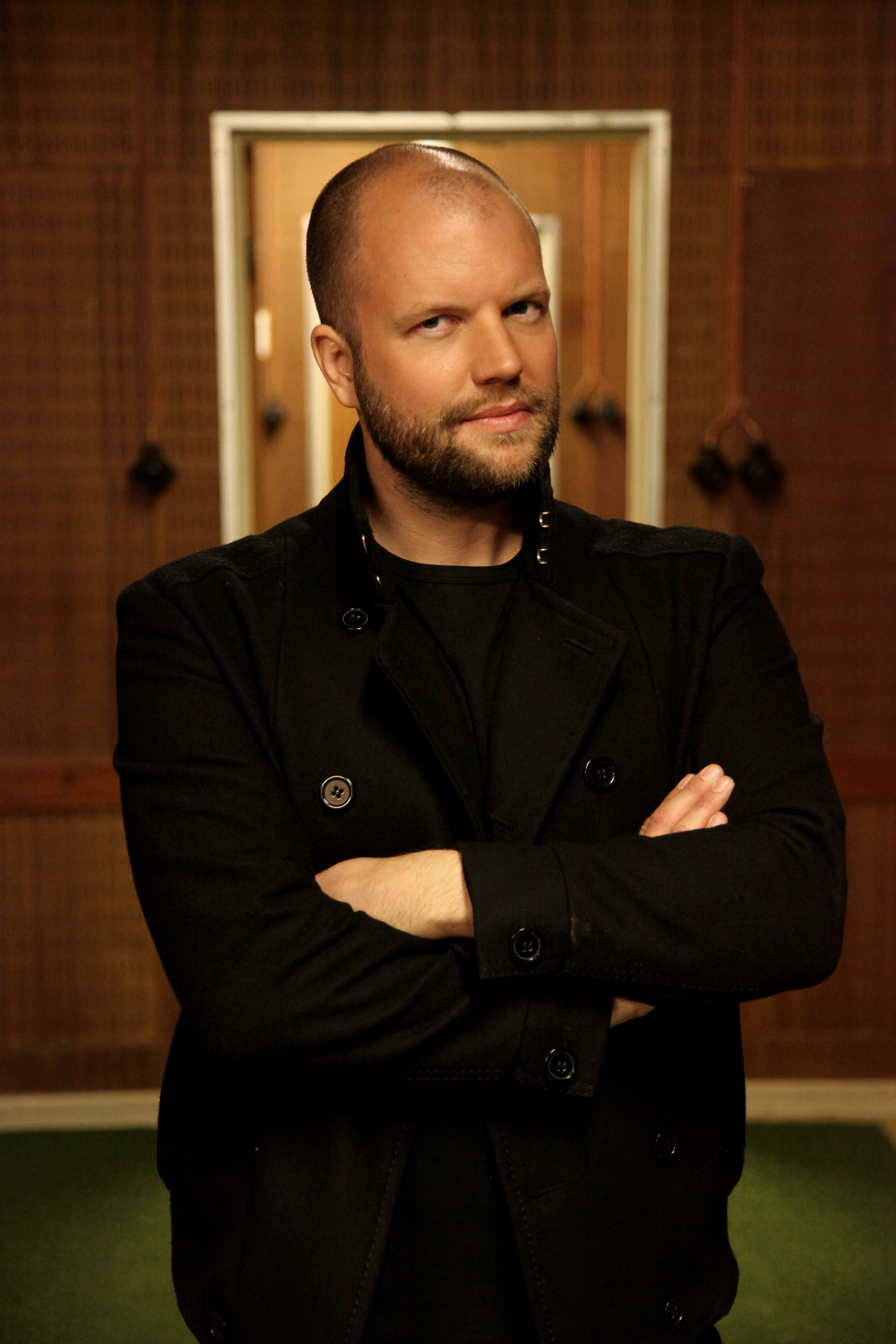 Programledaren Melker Becker.